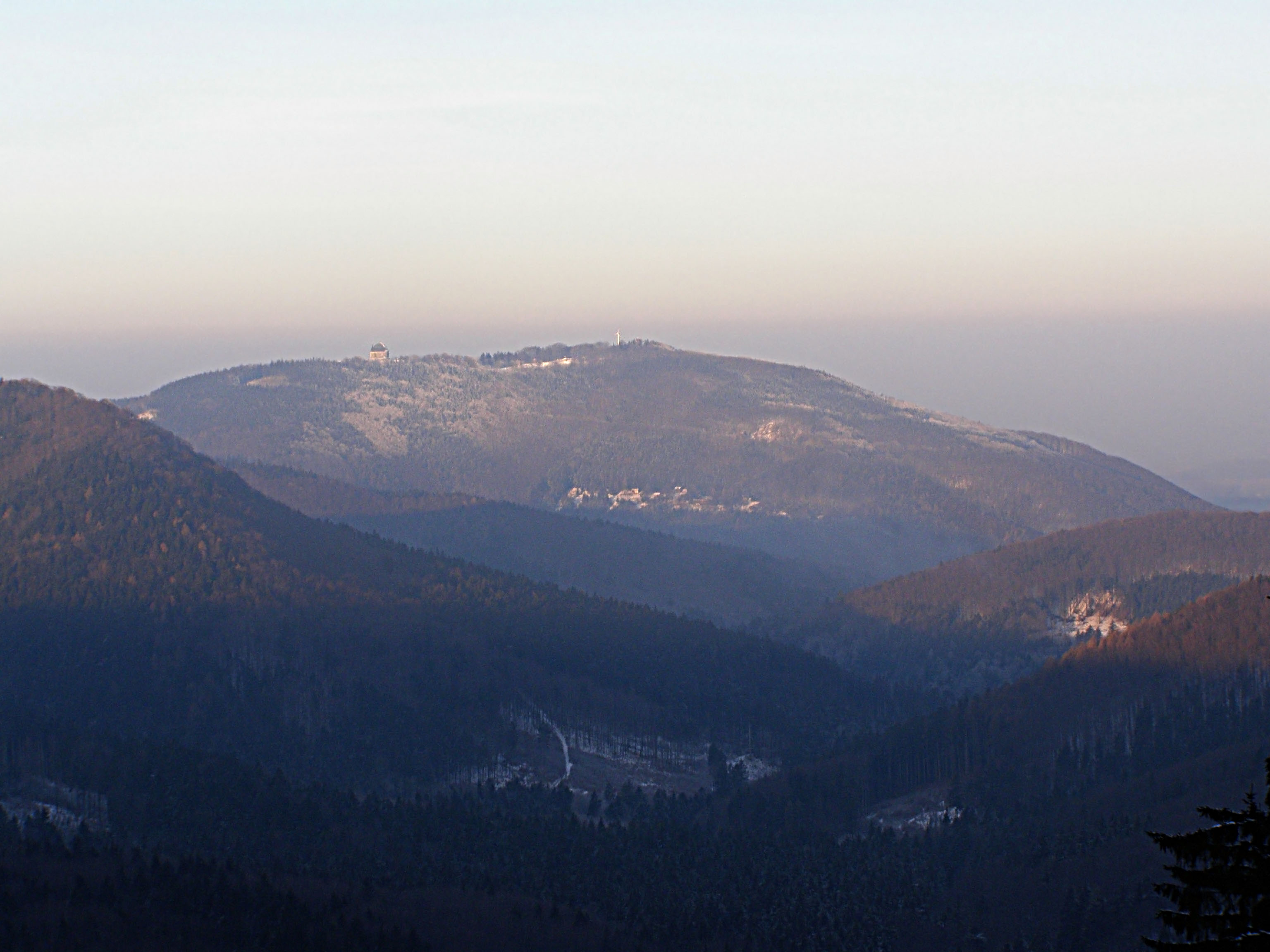 Hostýn (734 m), pohled na východní stranu z úbočí Kyčery (757 m)